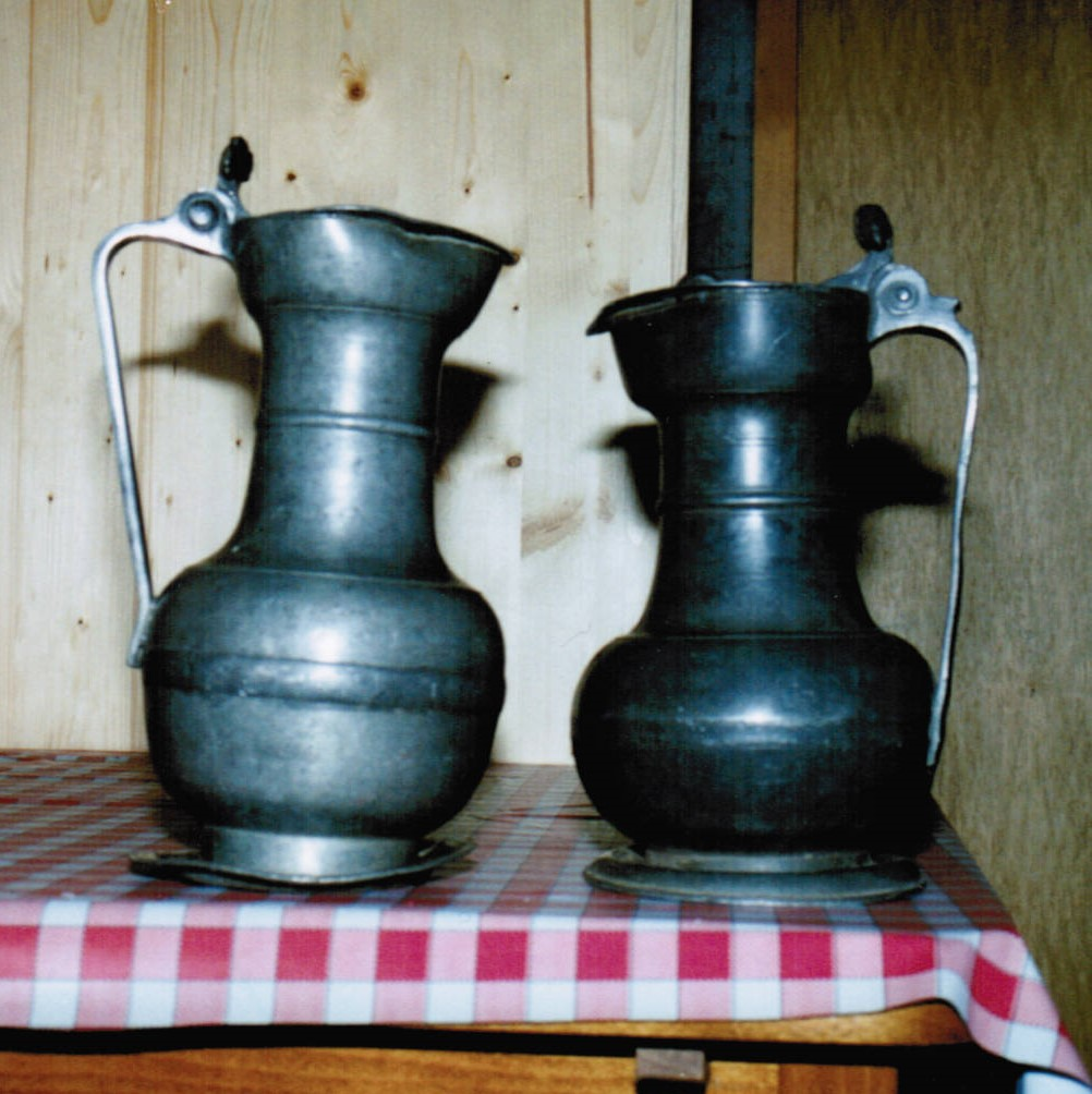 Die zwei erhaltenen Zinnkannen der Schützenzunft von Herbriggen aus dem 19. Jahrhundert , St. Niklaus, Schweizer Kanton Wallis.